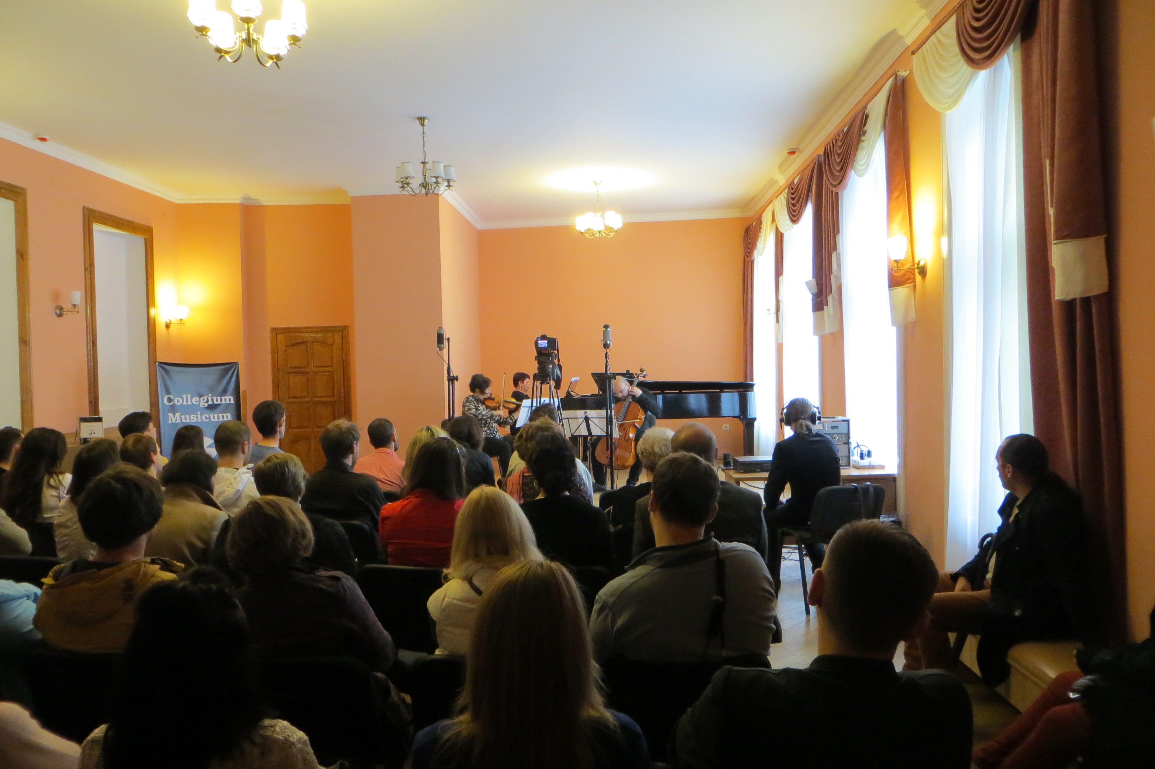 Мала зала у Львівській філармонії